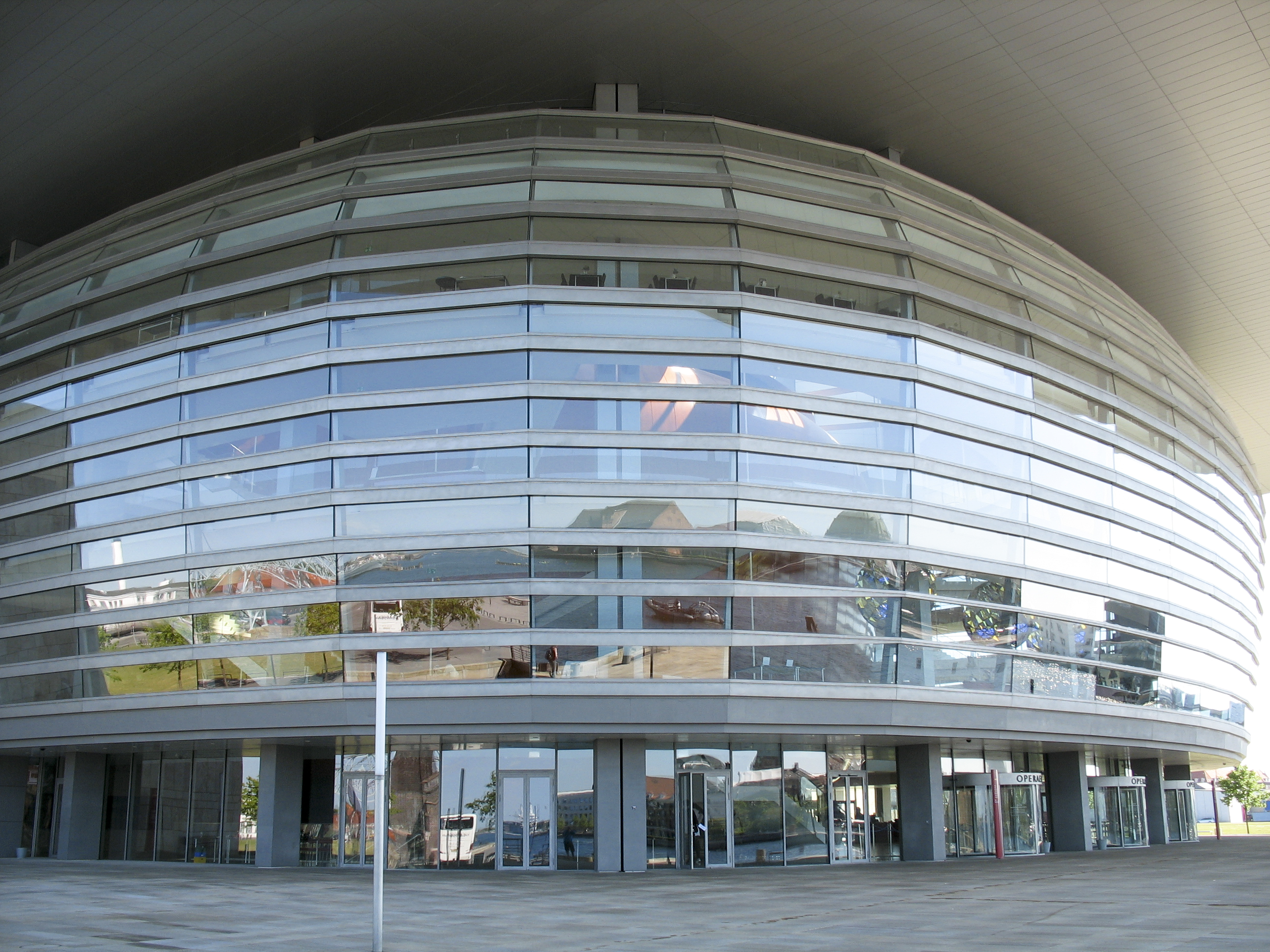 Copenhagen Opera House - entrance